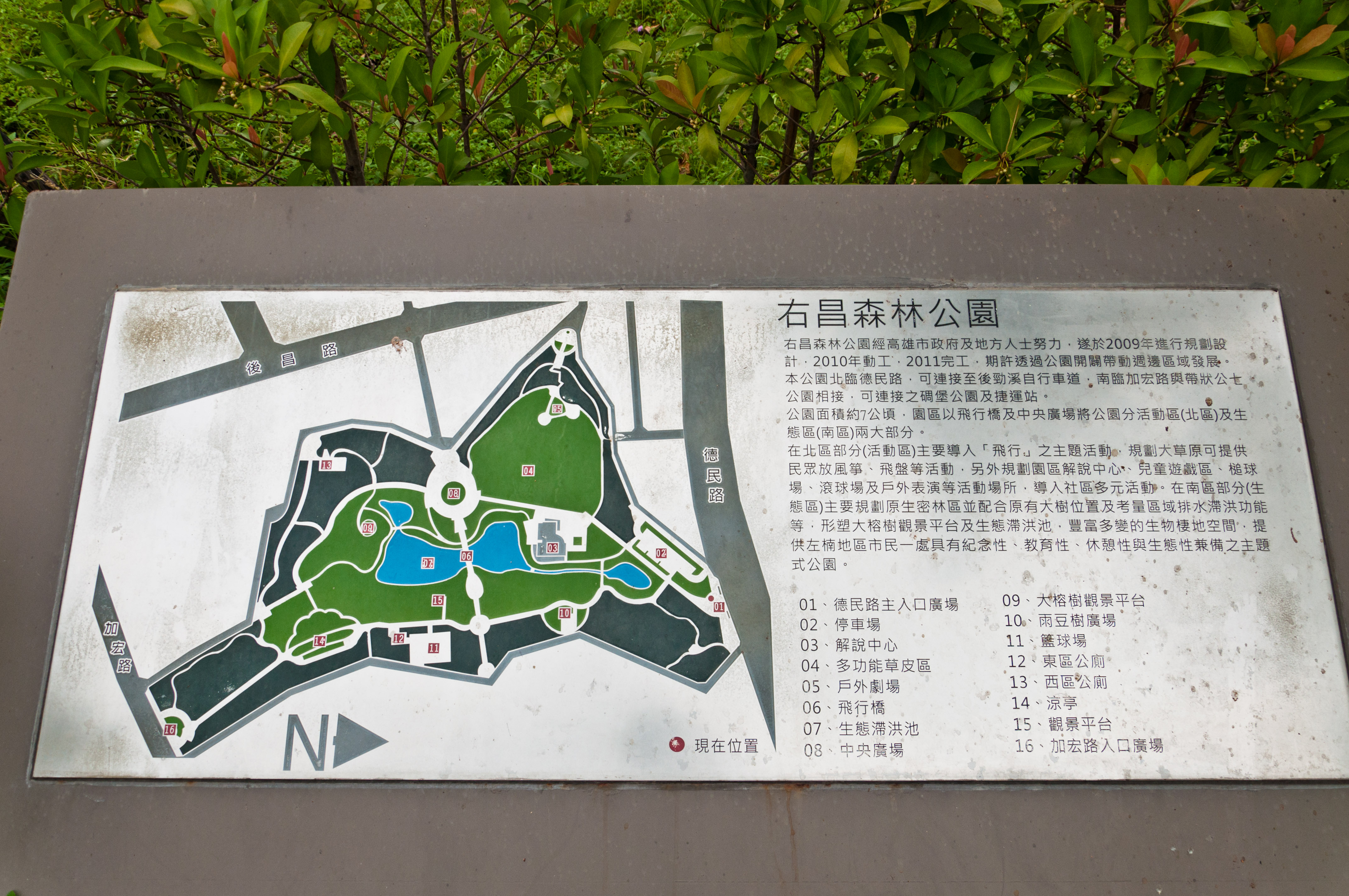 臺灣高雄右昌森林公園地圖